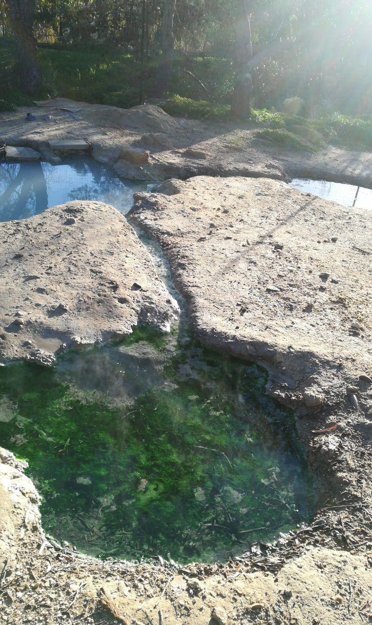 acqua sulfurea che affiora nella calle dei bagni